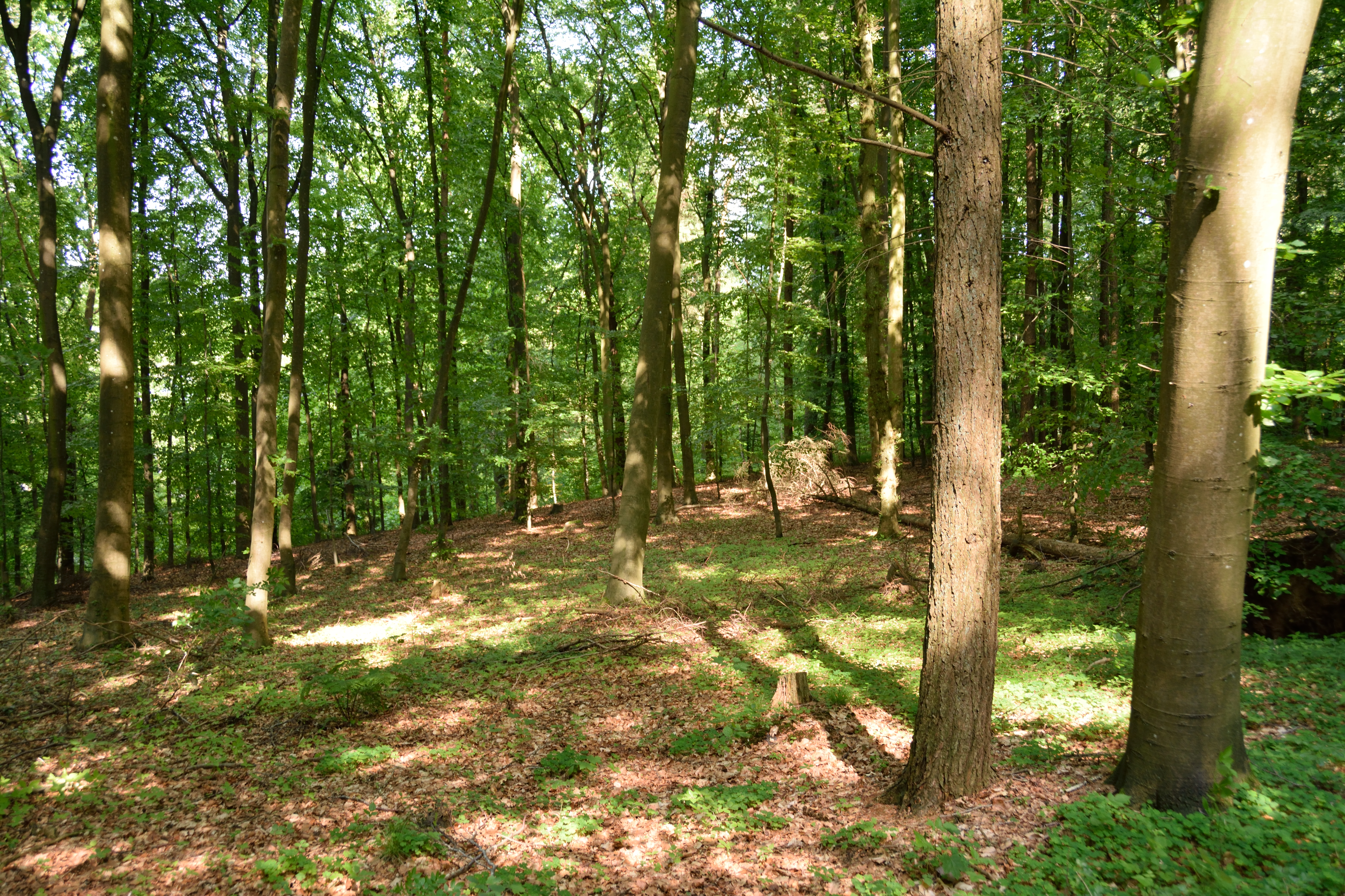 Der Kreis Steinburg hat mehrere Flächen unter dem gemeinsamen Namen " Landschaftsbestandteile und Landschaftsteile im Bereich mehrerer Gemeinden" zusammengefasst. Dieses Foto wurde im "Eichenwald Nordoe" aufgenommen, es ist das Teilstück Nr. 13.